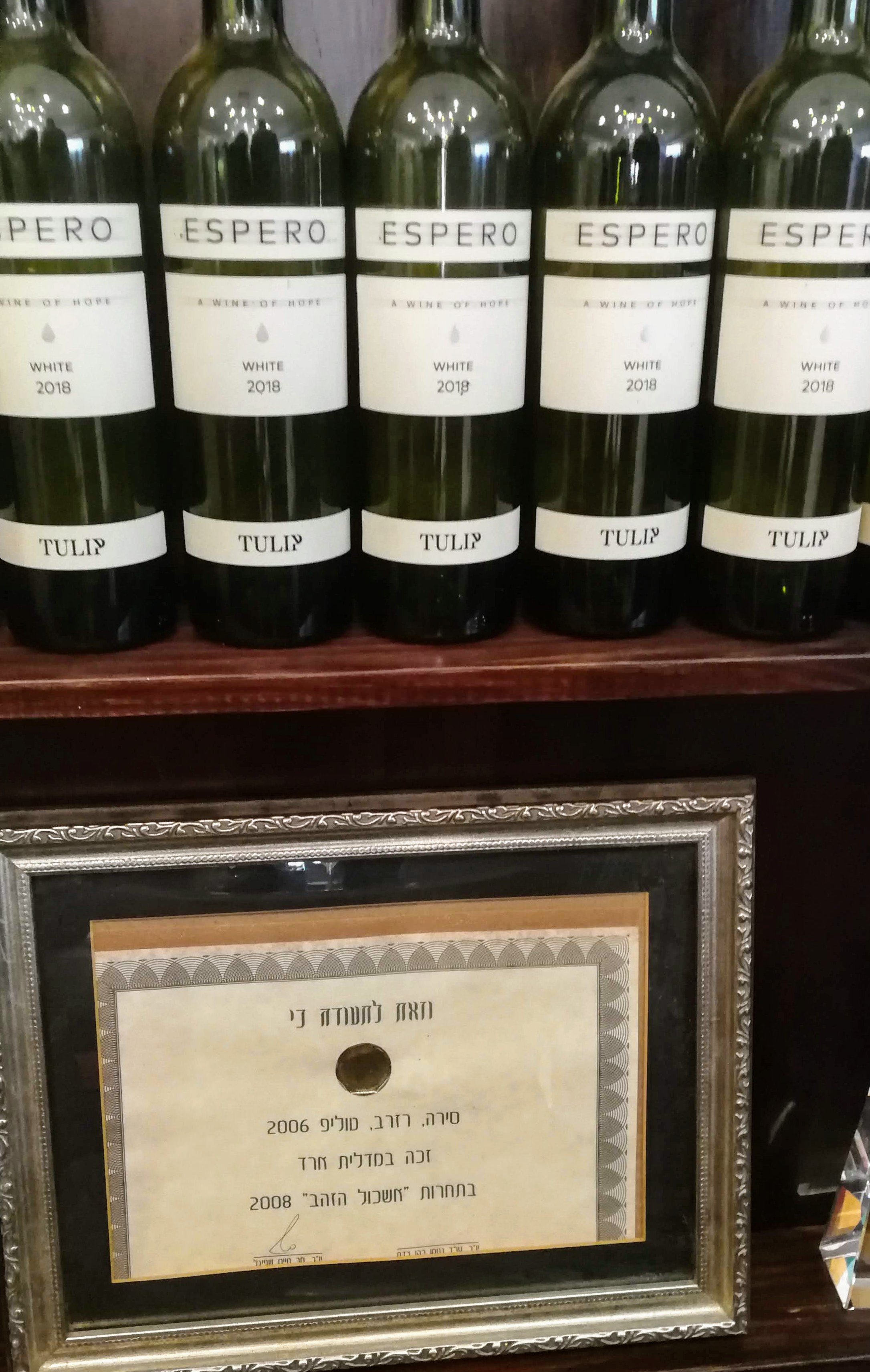 יקב טוליפ, כפר תקווה